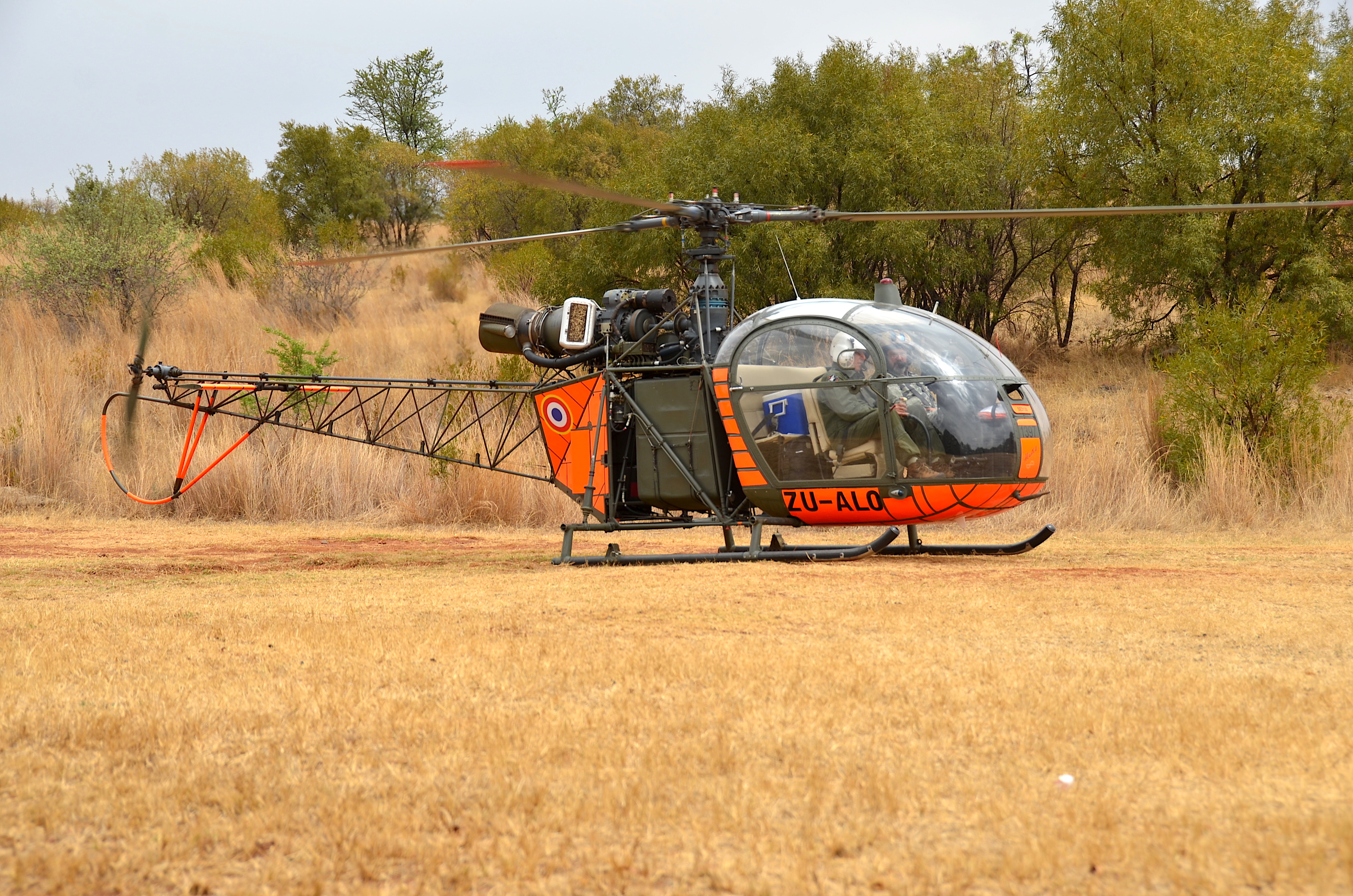 Sud Aviation SE.3130 Alouette II ZU-ALO in Südafrika